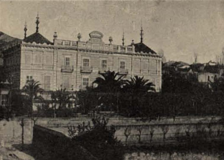 Casa Tolrà (Castellar del Vallès)